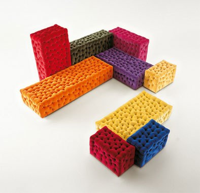 Divano modulabile firmato da Gaetano Pesce e ispirato del panino milanese (michetta).